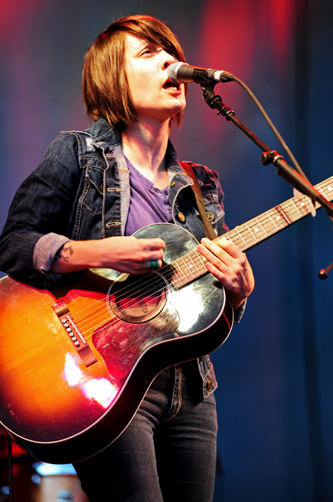 Tegan and Sara @ NIB Stadium (4/12/2010)